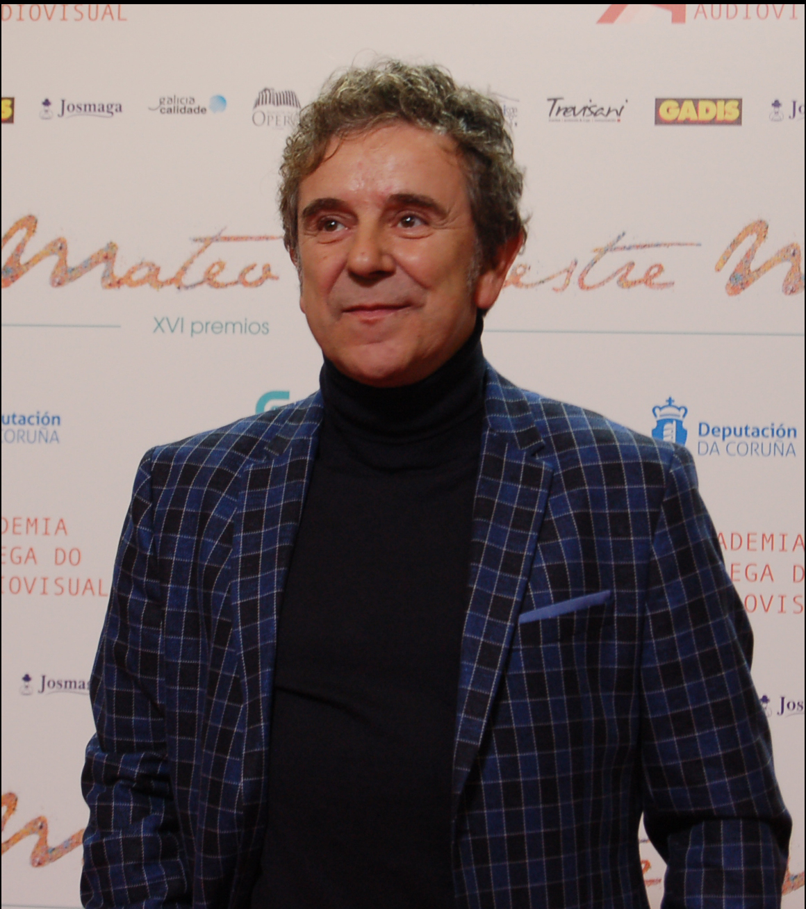 Miguel de Lira nos Premios Mestre Mateo 2017